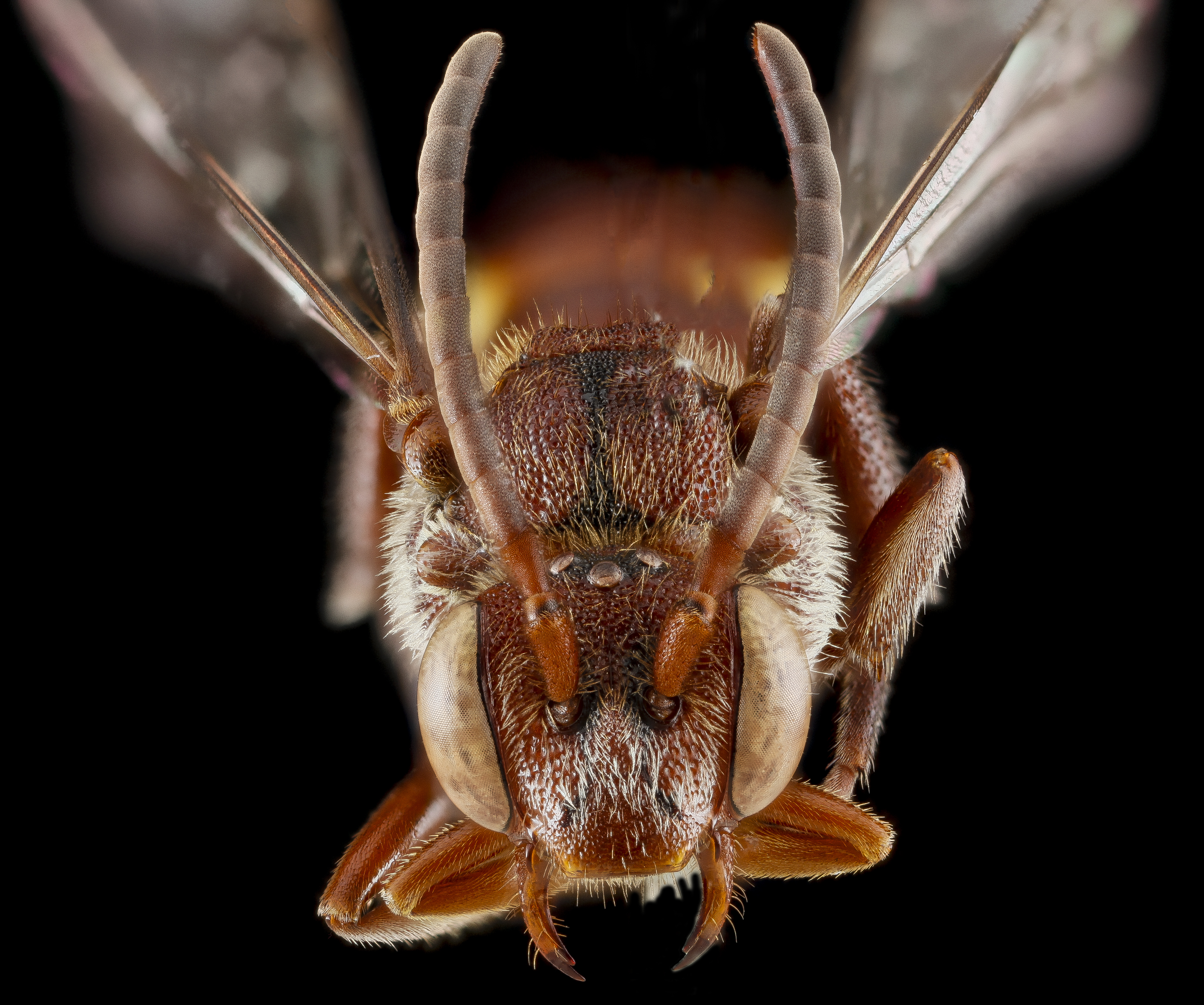 Nomada maculata, Acadia National Park